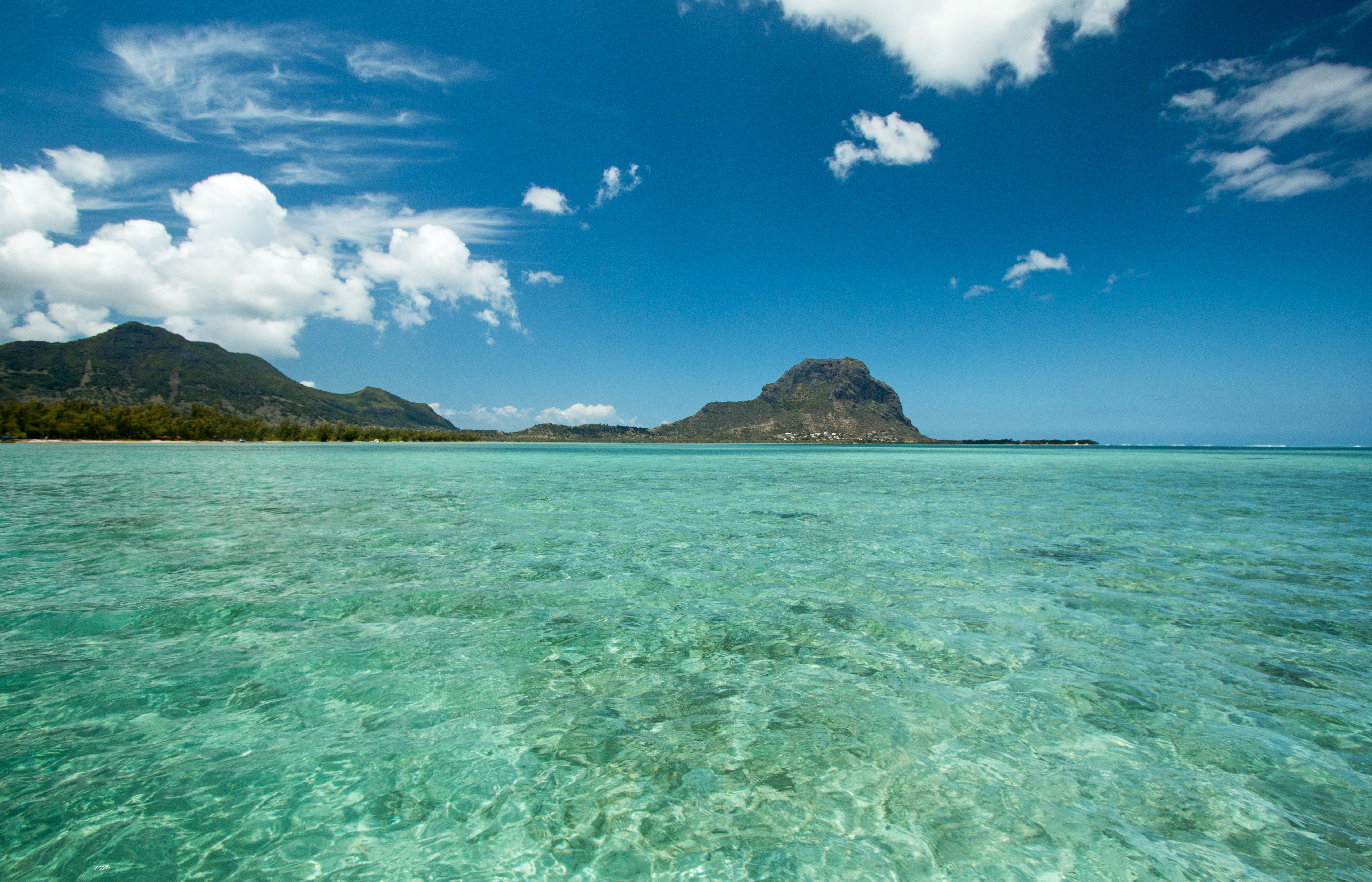 Île aux Bénitiers and Le Morne